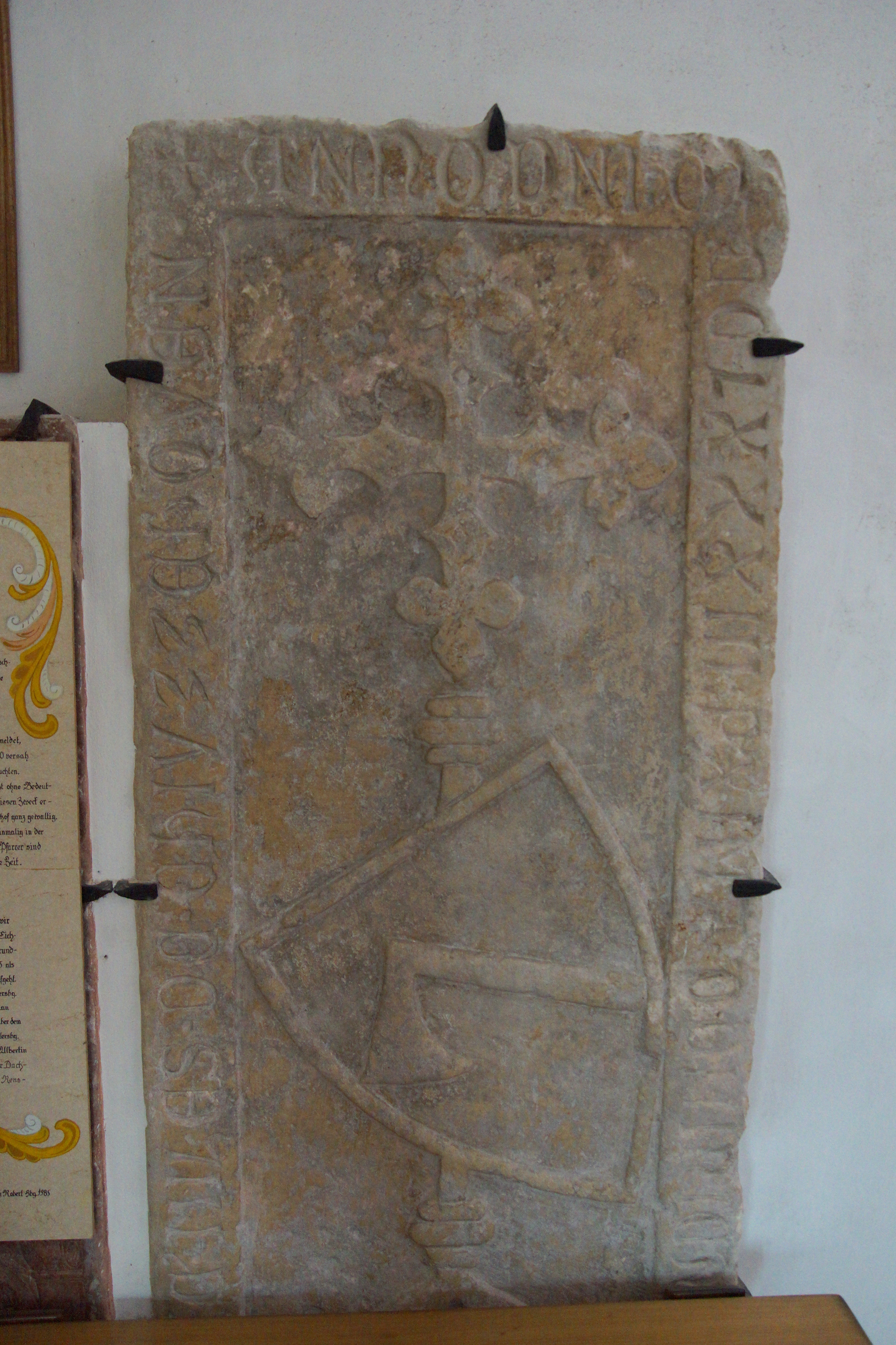 Katholische Pfarrkirche St. Michael in Allersburg, Markt Hohenburg in der Oberpfalz: Grabstein (Stabkreuzplatte) des 1283 verstorbenen Ritters Heinrich von Kutzenhofen (MILES DE CHIVZZEHOVEN). Gravestone of the knight Heinrich von Kutzenhofen (d. 1283), St. Michael in Allersburg (Bavaria)